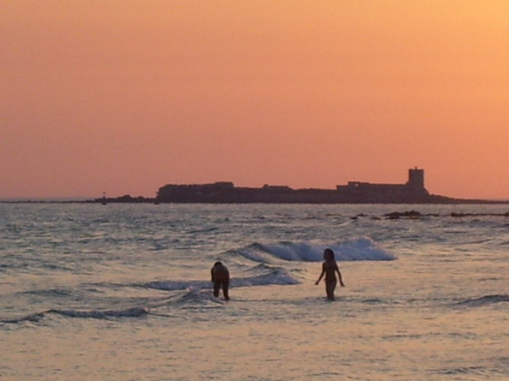 Vista, al atardecer, del castillo de Sancti Petri ( perteneciente a San Fernando ) desde la Playa de la Barrosa, en Chiclana de la Frontera, (Cádiz, España).